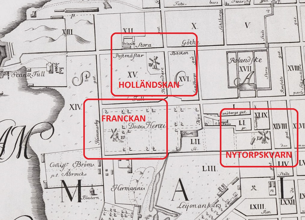 Kvarnar på Tillaeus' karta från 1733, väster om Götgatan: r är Nytorps qvarn, v är Hollenskan och w är Franckan (norr är till höger)